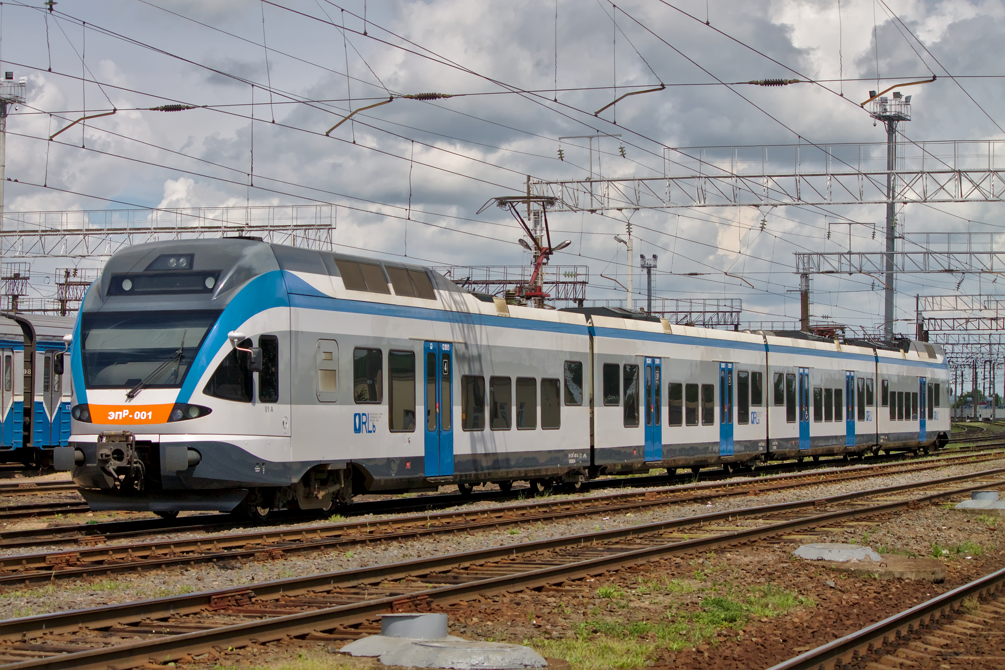 ЭПр-001, Орша-центральная. см. фото 601667 в альбоме автора